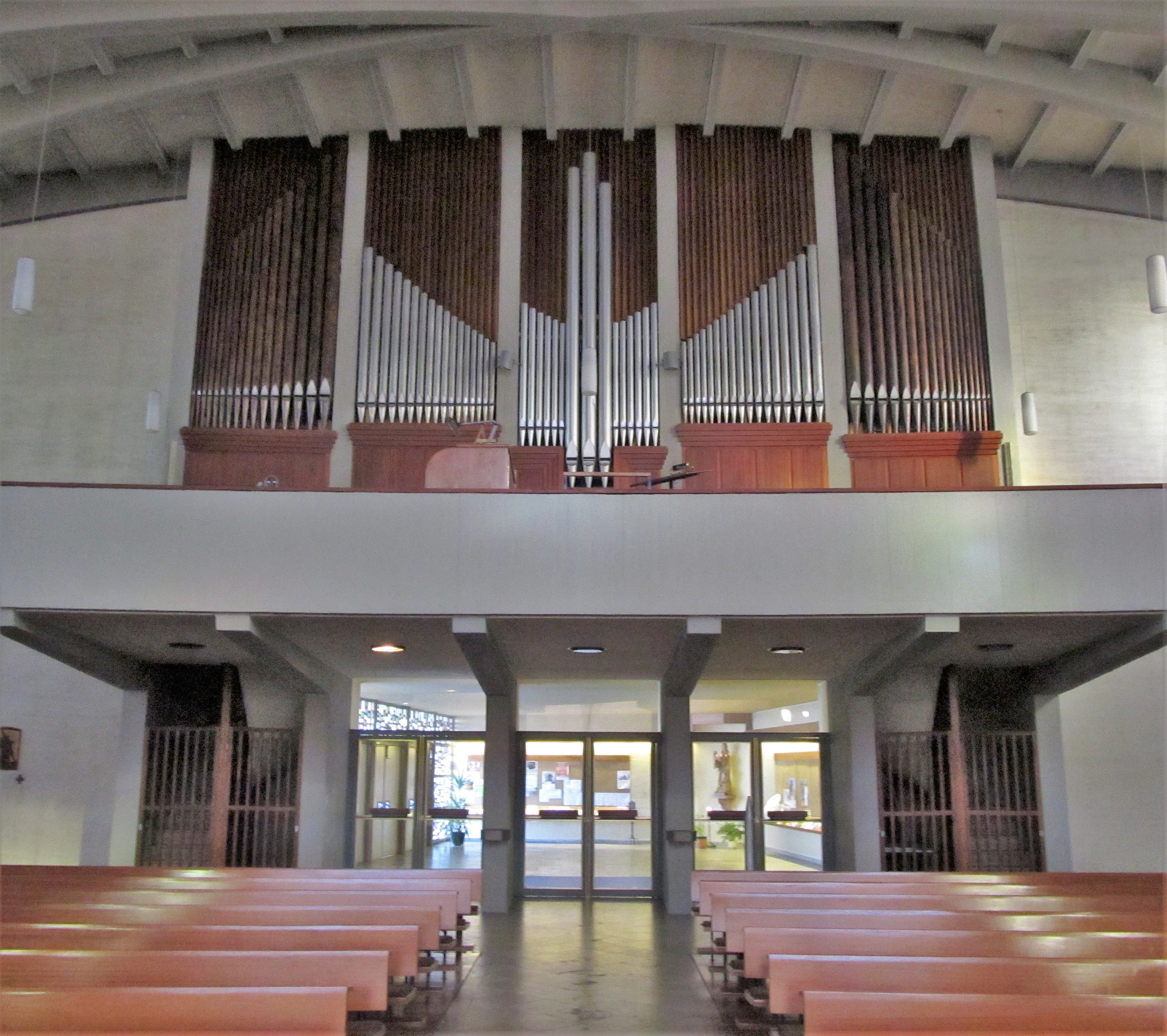 Orgelprospekt der katholischen Pfarrkirche St. Barbara in Saarbrücken-Dudweiler, Saarland